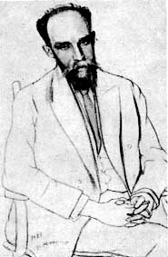 Nikolai Efros, a pencil's picture